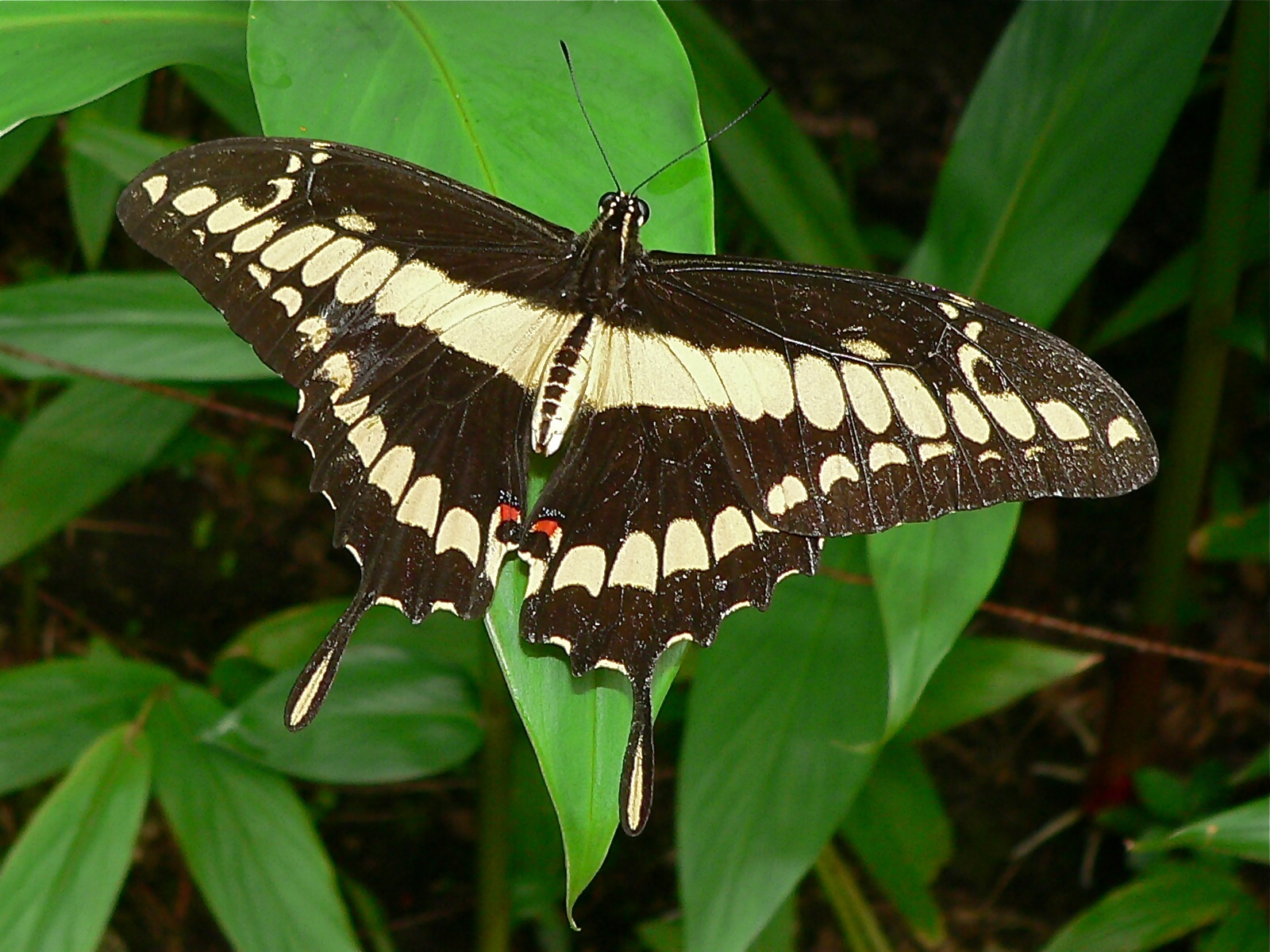 Spirogyra Butterfly Garden, San Jose, COSTA RICA